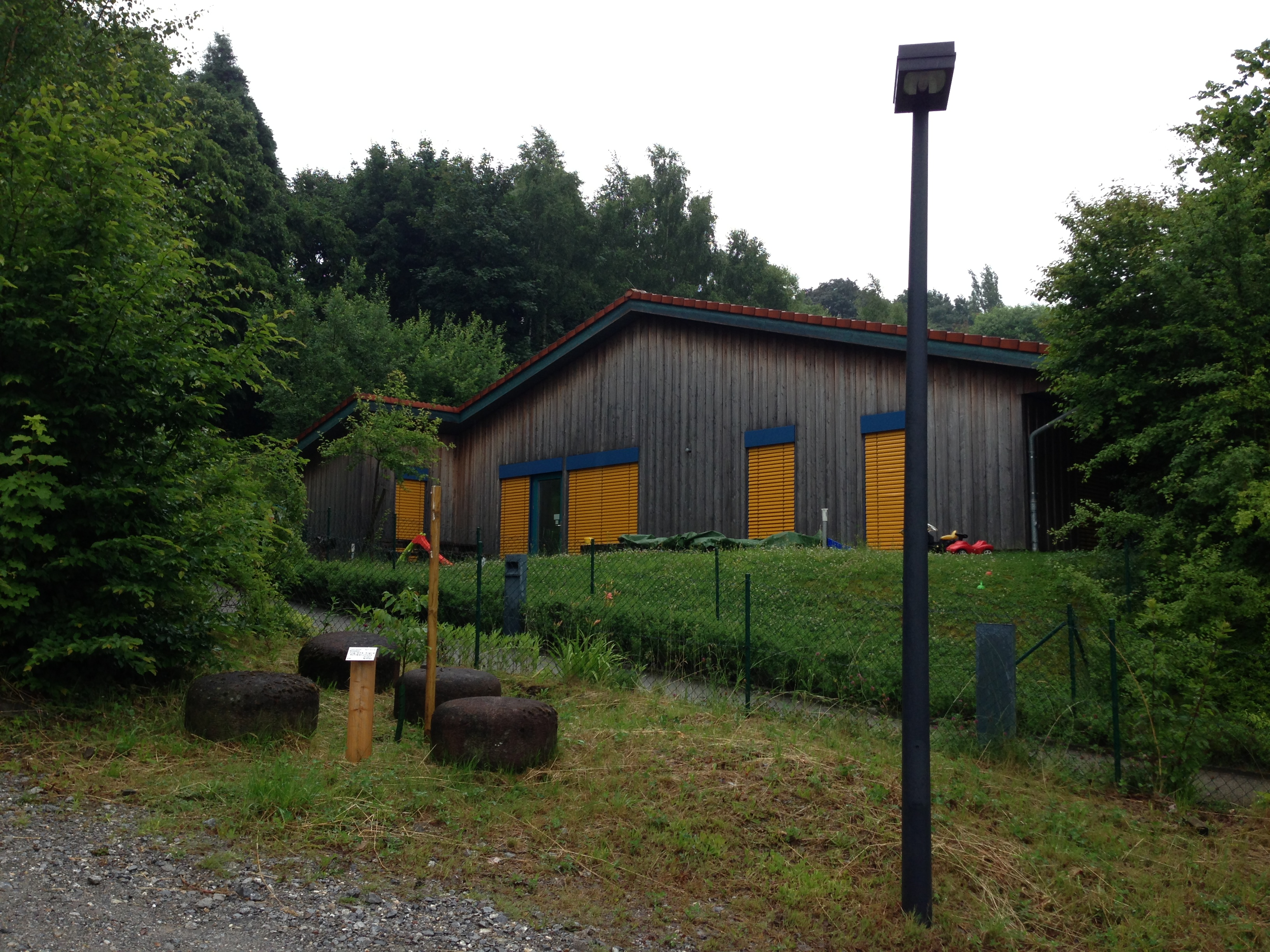 Hochschulkindergarten der Bergischen Universität Wuppertal.